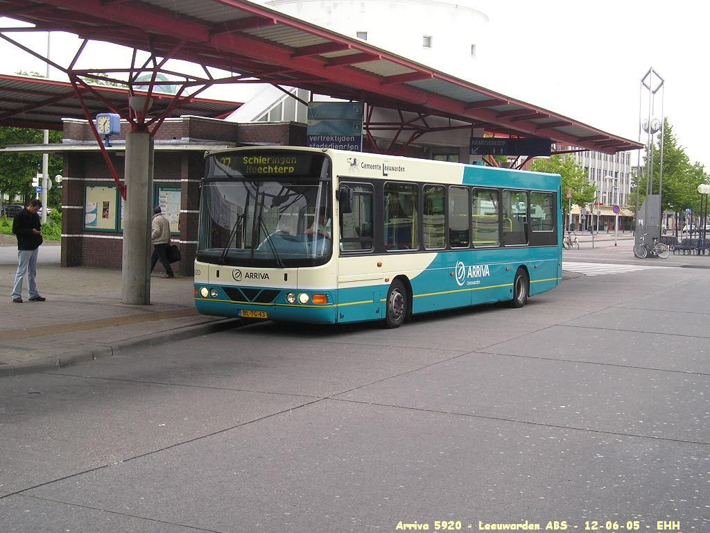 Arriva 5920 Leeuwarden ABS